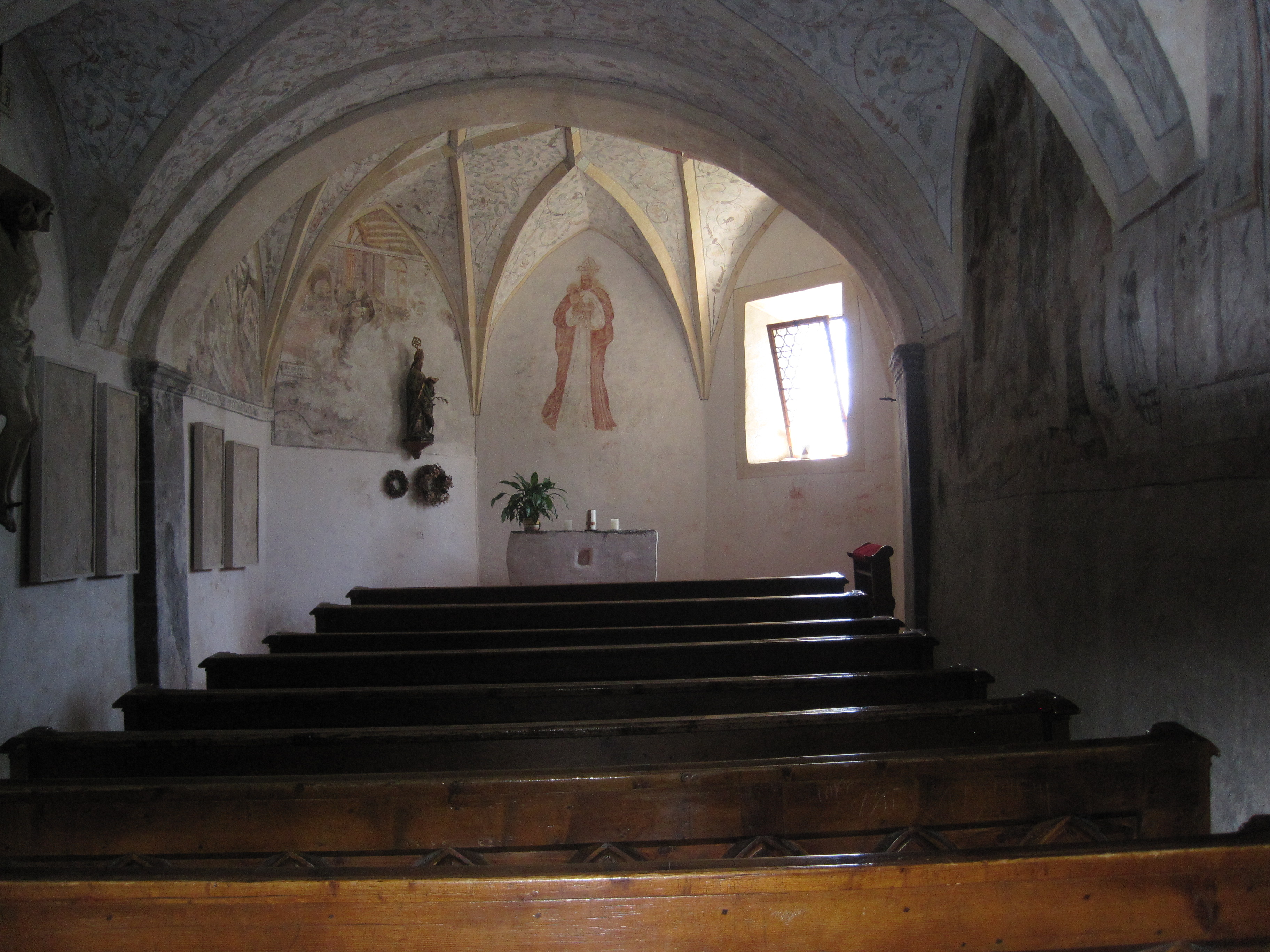 St. Ägidius (Schlanders) Innenraum